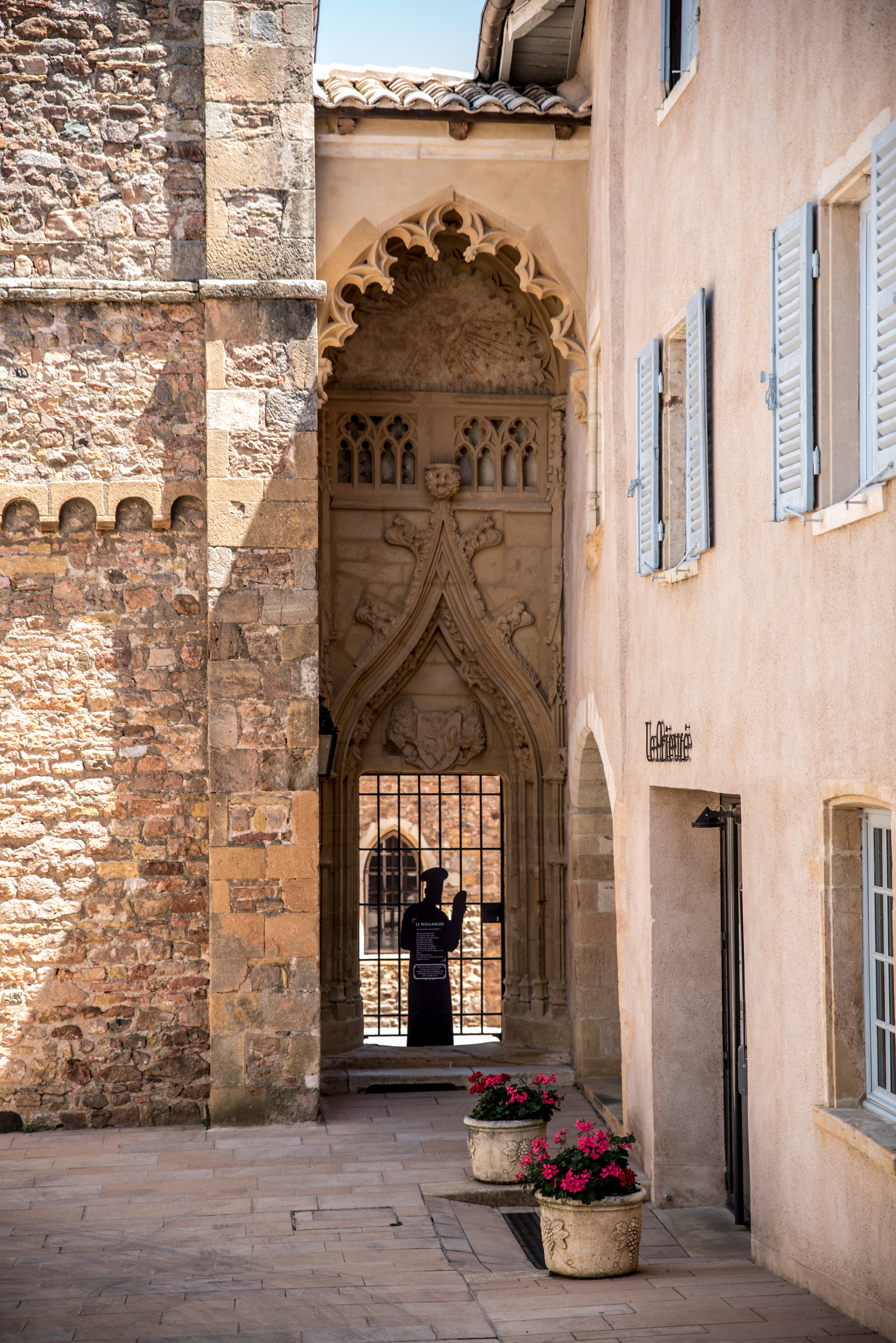 Porte d'entrée du cloître du prieuré de Salles-Arbuissonnas-en-Beaujolais